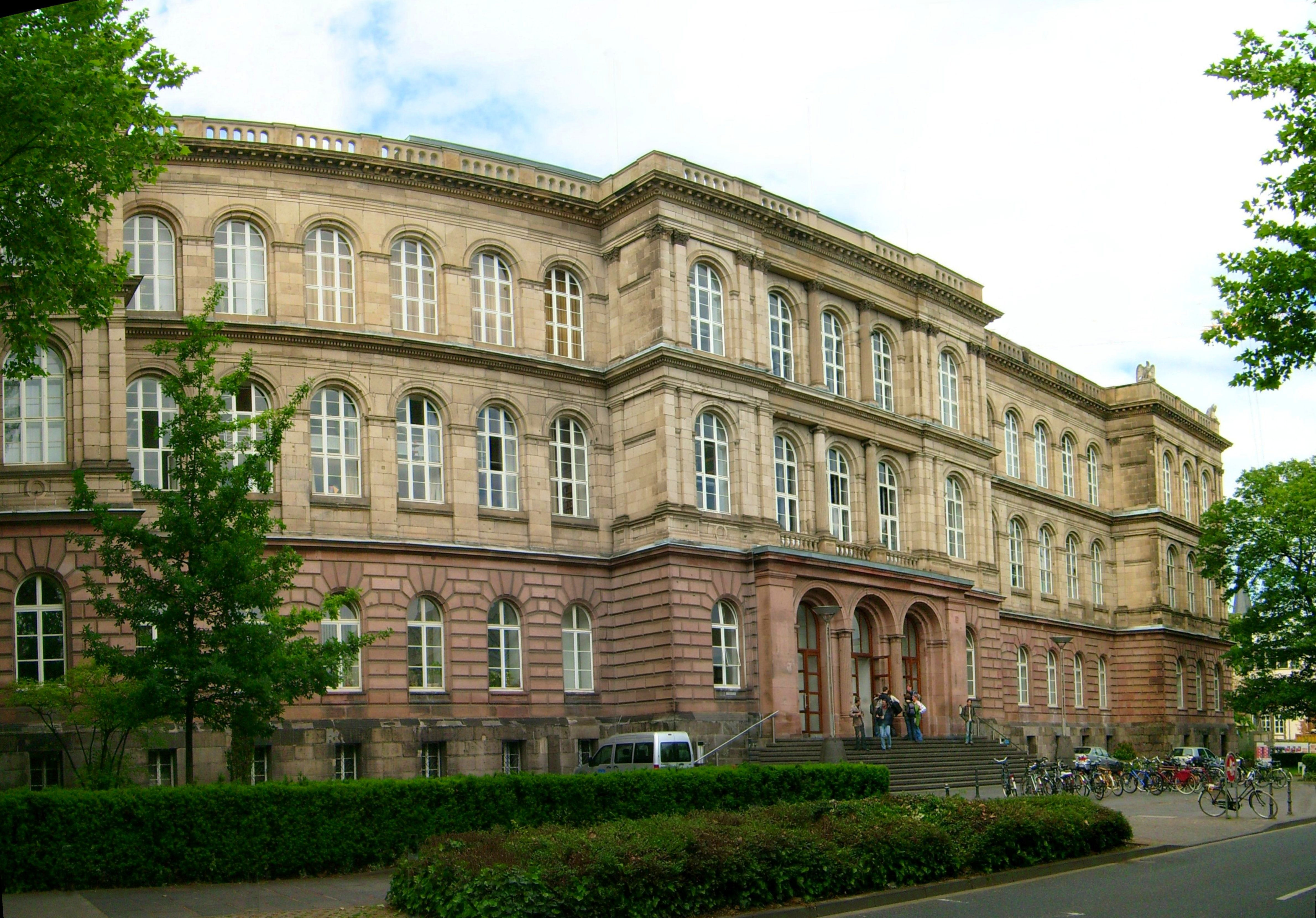 Hauptgebäude RWTH Aachen